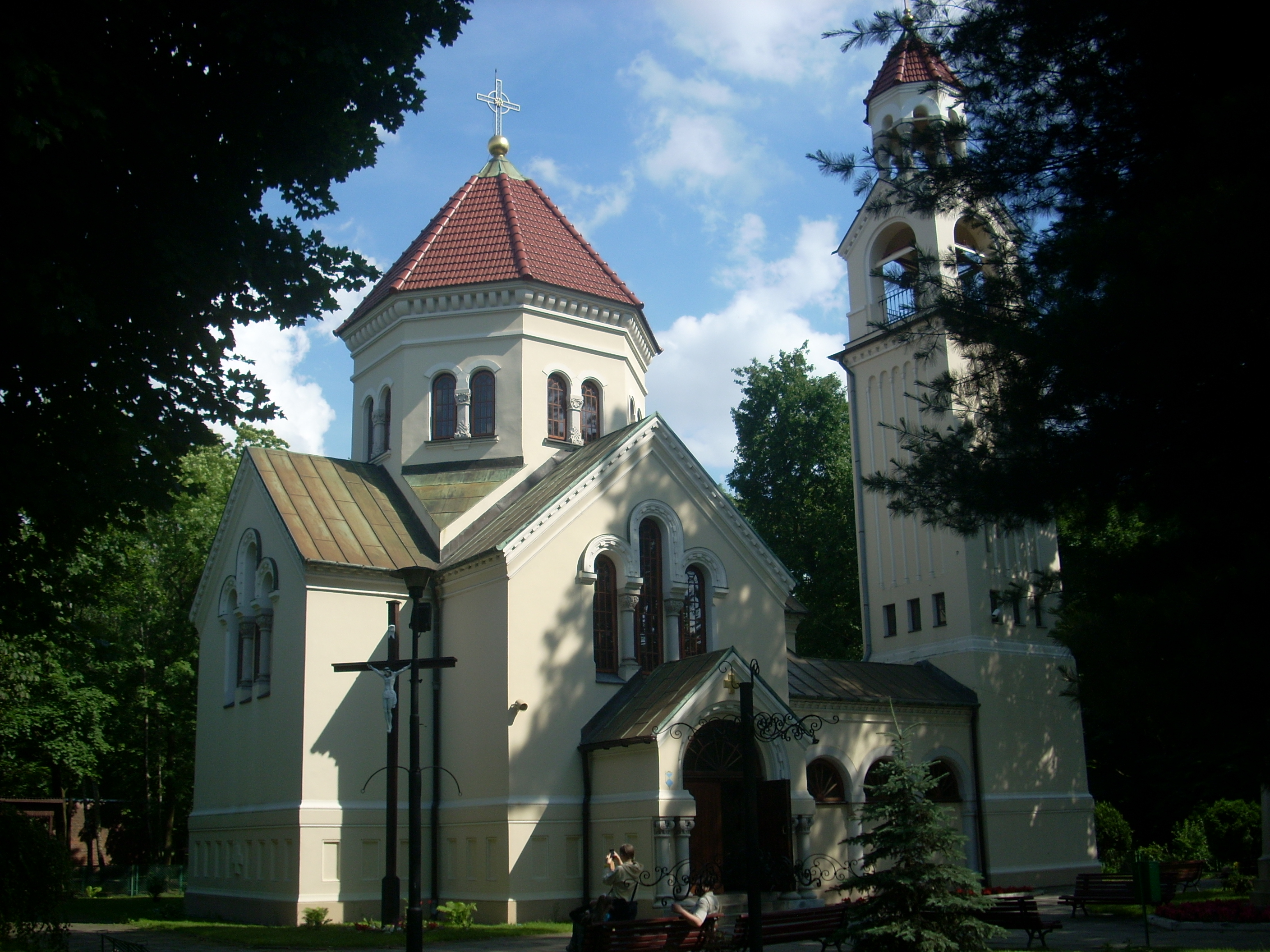 Kościół przy szpitalu w Tworkach, dawna cerkiew św. Aleksego